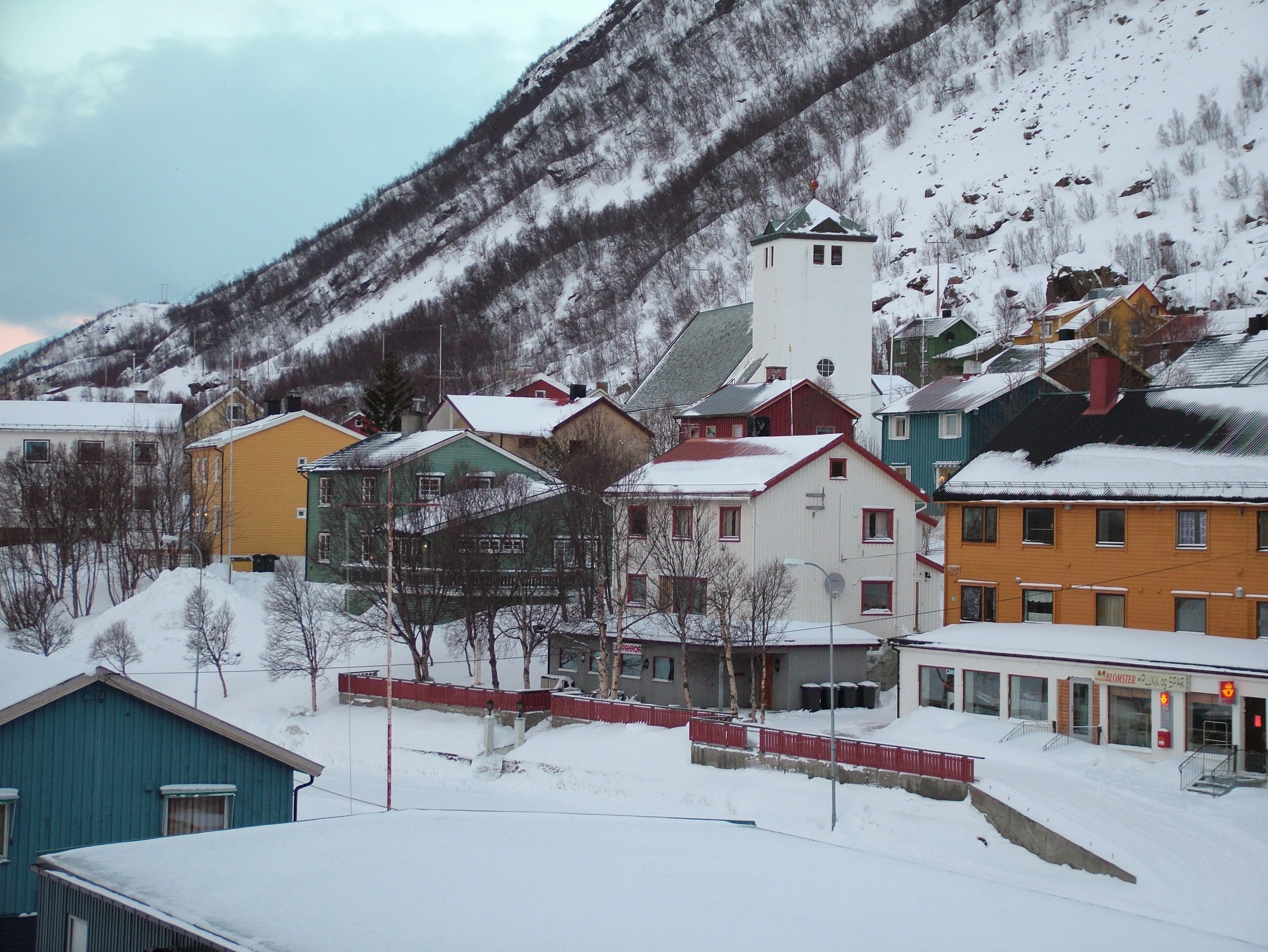 Die Gemeinde Øksfjord in Nordnorwegen im Februar 2005. Das Bild habe ich selber fotografiert von einem Schiff der Hurtigruten (MS Finnmark) aus.